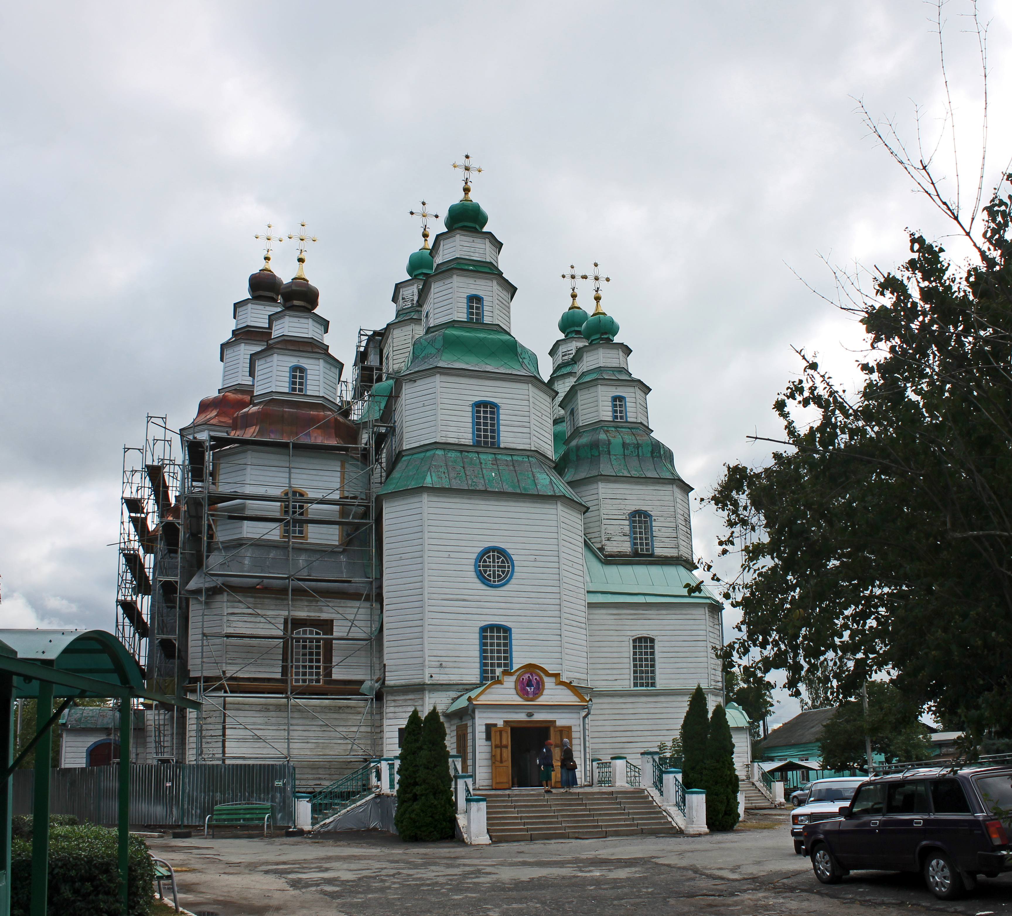 Троїцький собор 1775 - 1780рр., пл.Перемоги,1, м.Новомосковськ